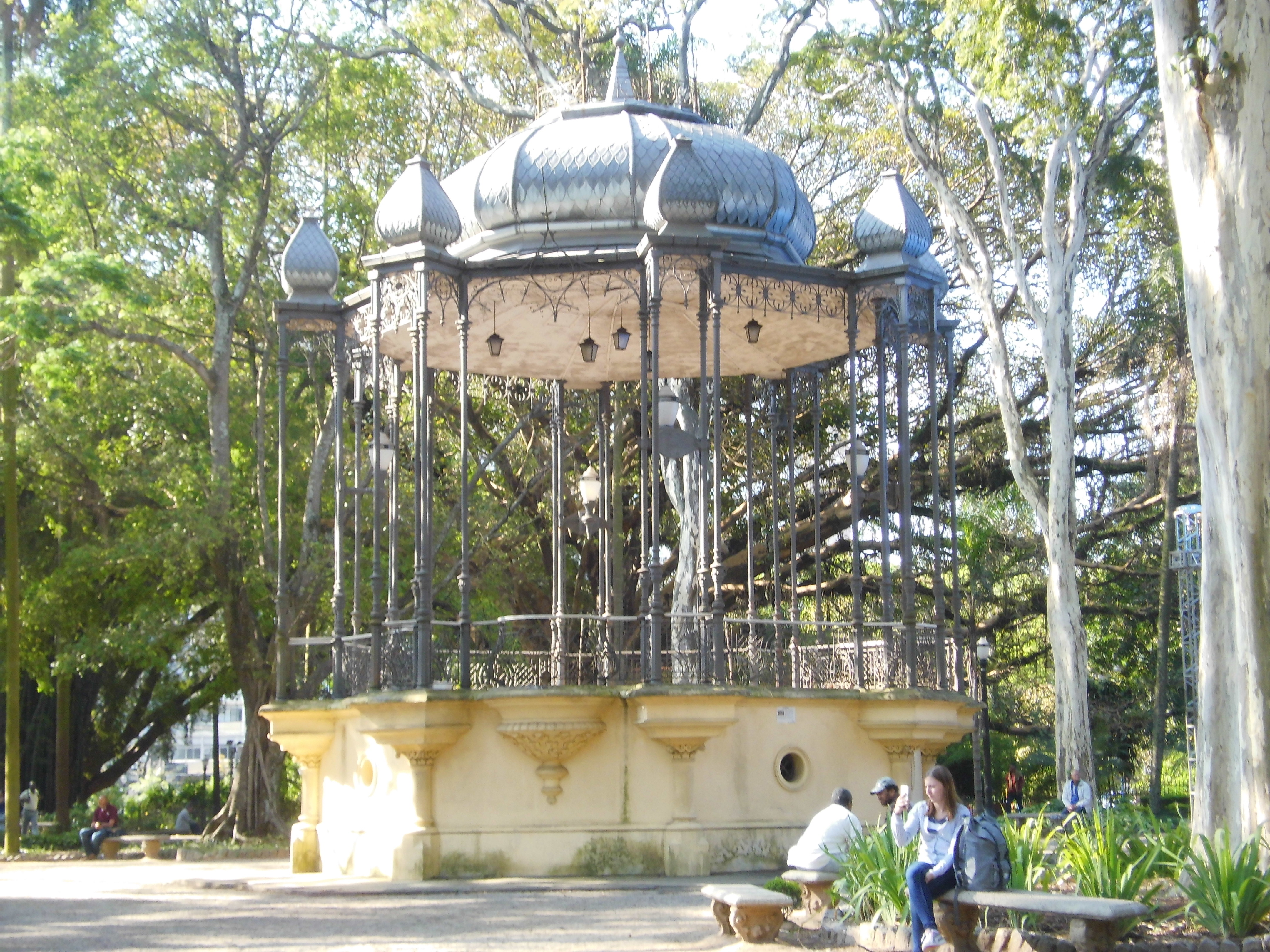 Coreto do parque Jardim da Luz (São Paulo-SP, Brasil), onde ocorrem apresentações.